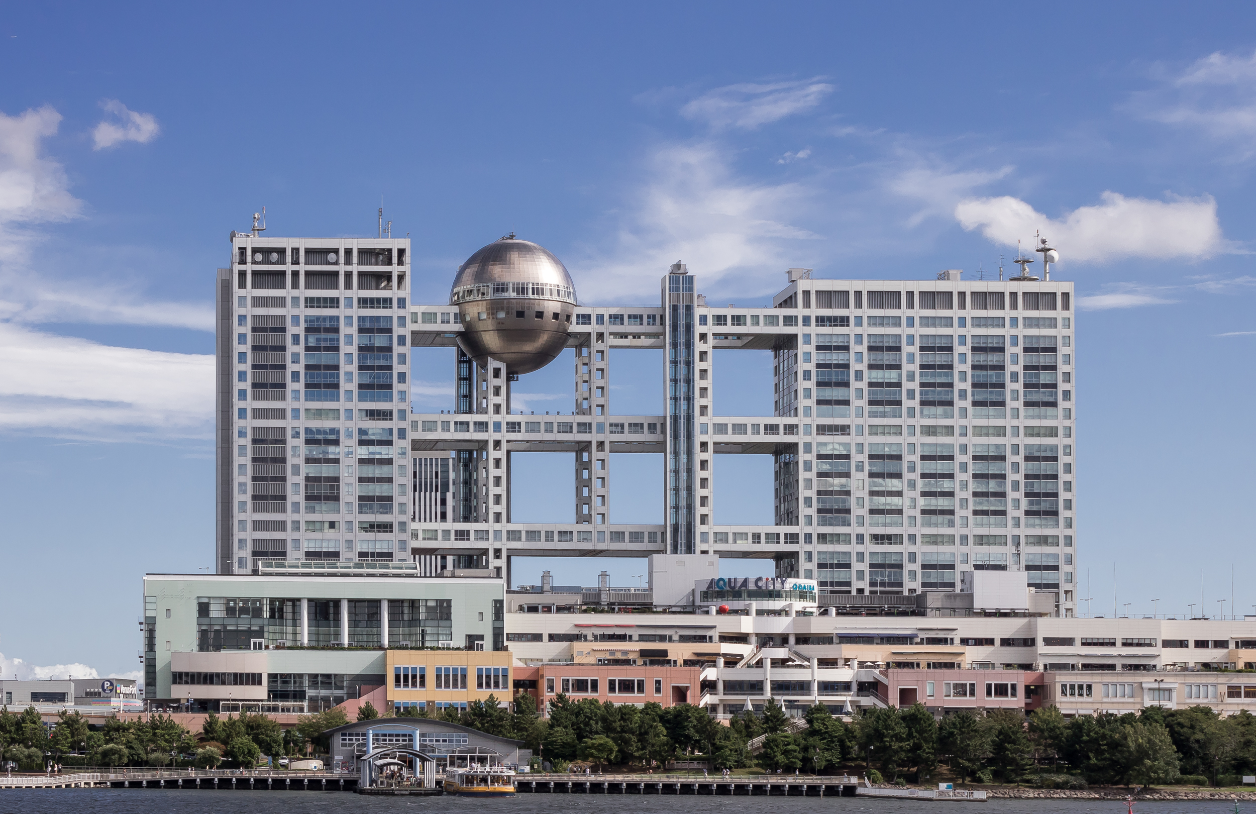 FCGビル.丹下健三設計